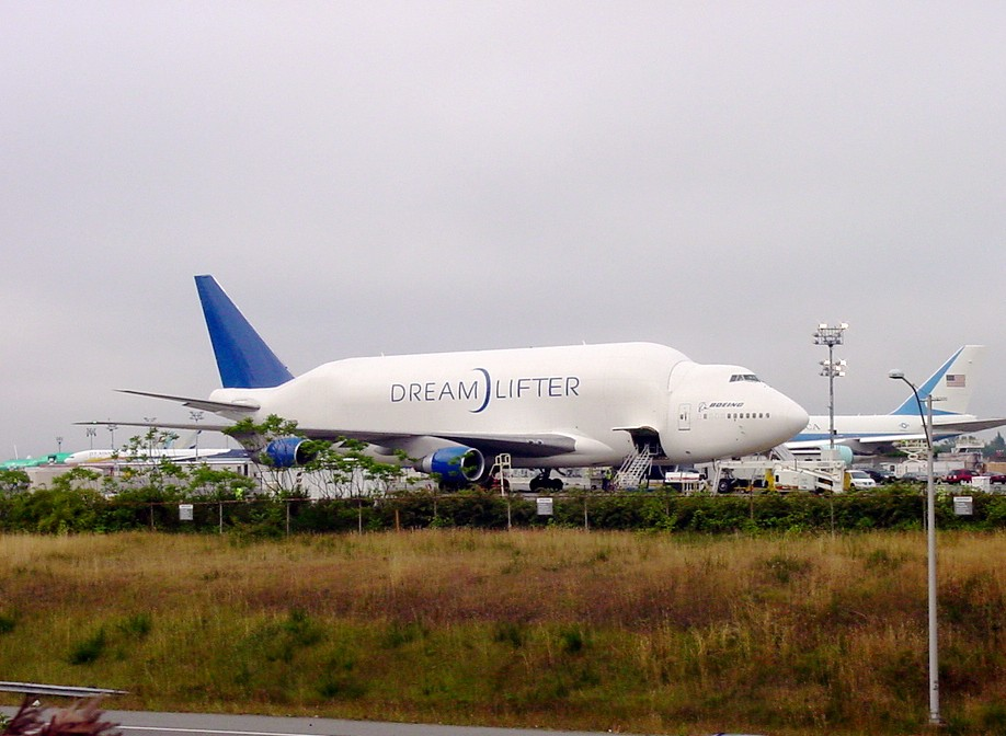 Boeing 747 LCF DreamLifter No.2 N780BA at Paine Field Airport